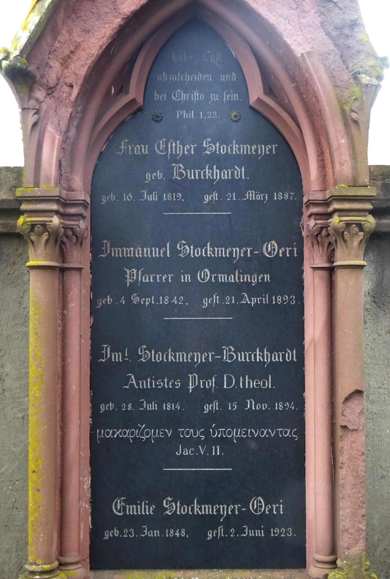 Familien Grab auf dem Friedhof Wolfgottesacker, Basel. Immanuel Stockmeyer-Burckhardt (1814–1894), Immanuel Stockmeyer-Oeri (1842–1893)